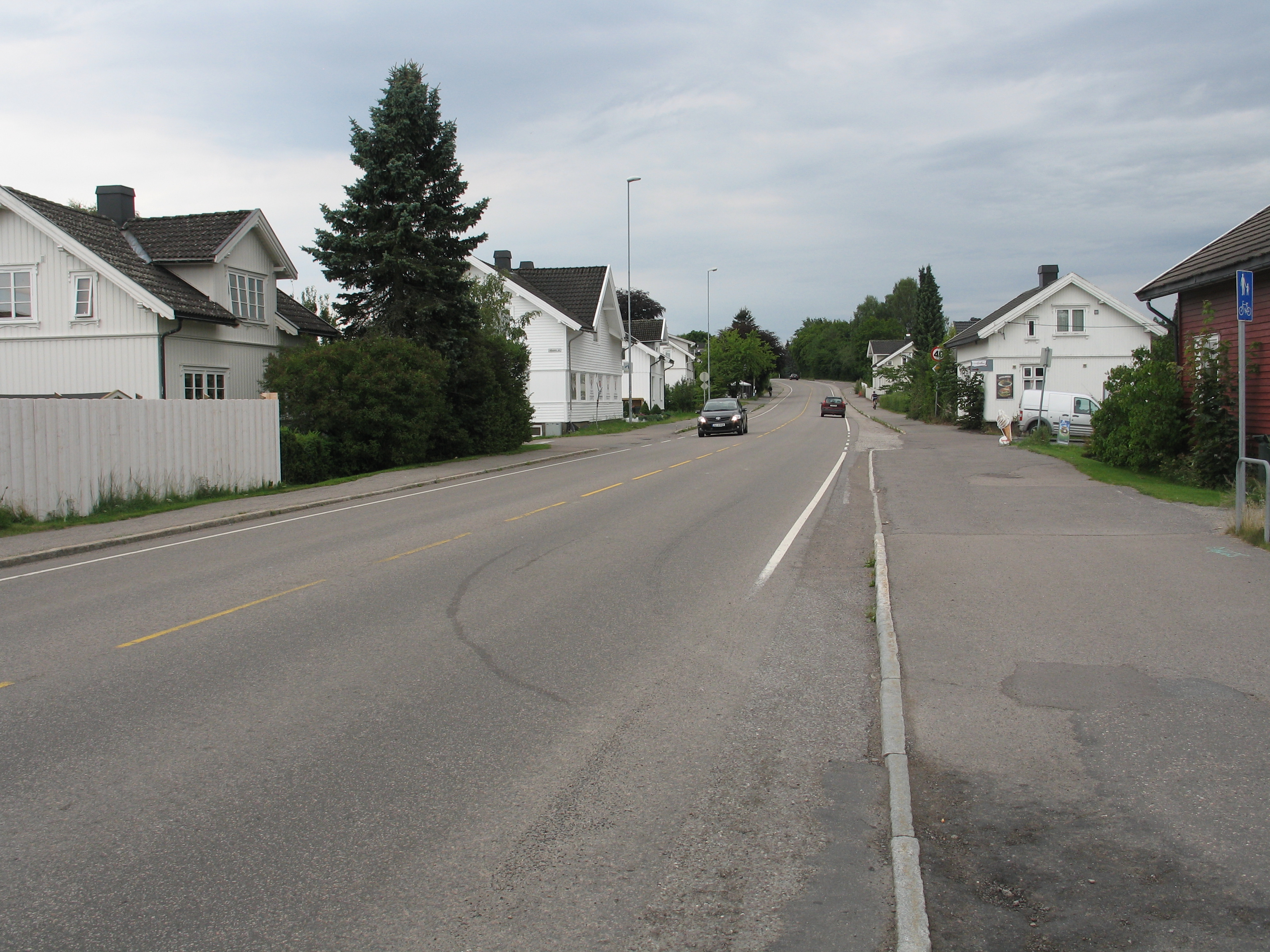 Villabebyggelse langs gamle Sørlandske hovedvei Sem i Vestfold